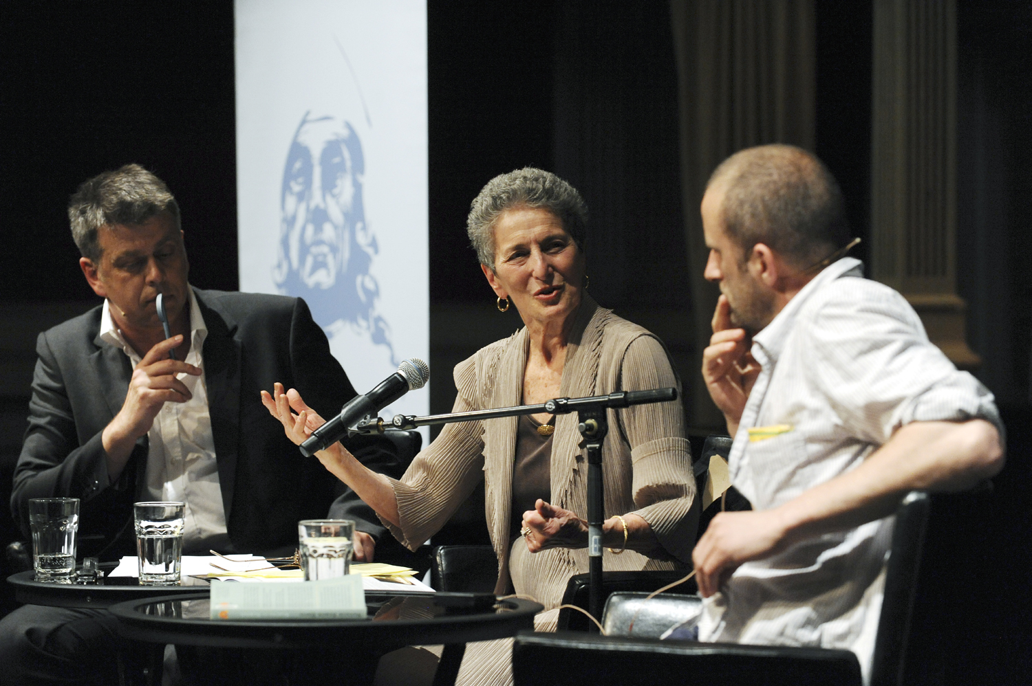 Holbergpris vinner Natalie Zemon Davis møter Jo Strømgren, tv. Erling S. Sandmo.. Foto: Marit Hommedal/SCANPIX